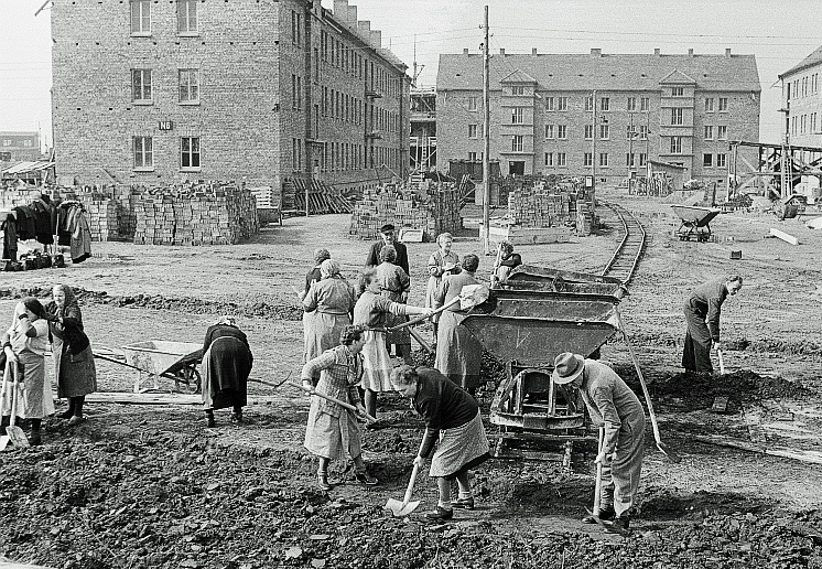 Original image description from the Deutsche FotothekSchaufelnde Aufbauhelfer auf der Großbaustelle Dunckerstraße